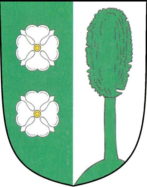 Znak obce Šerkovice